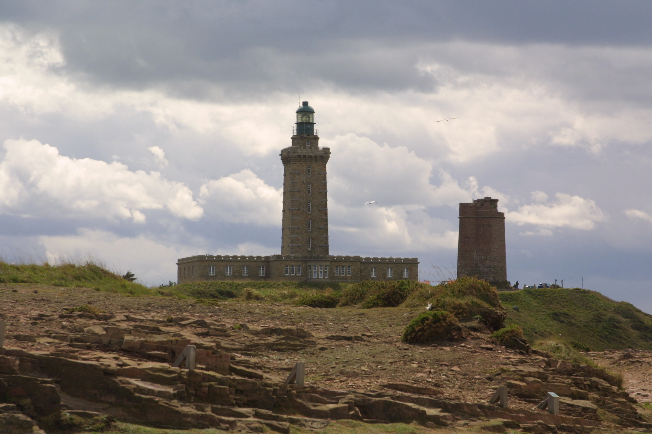 Phare du Cap Fréhel (22) - France